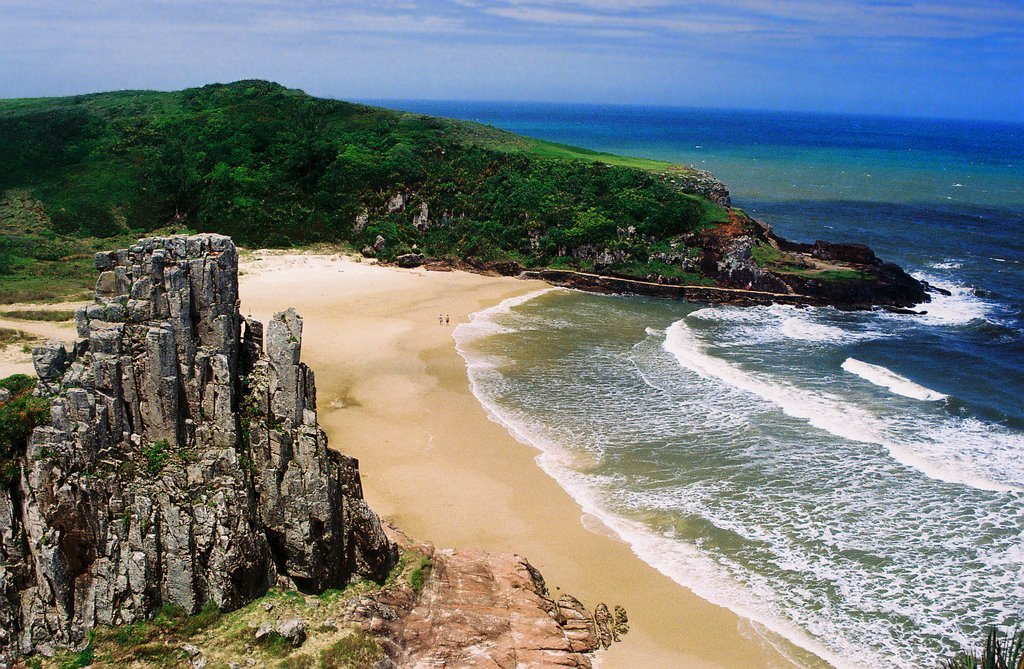 Torres - Rio Grande do Sul